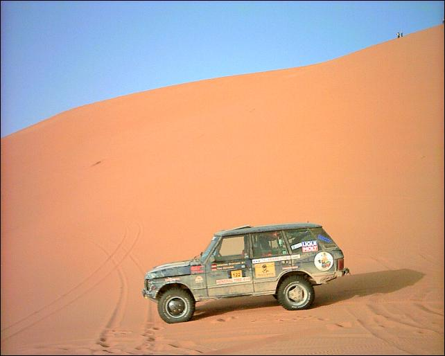 Range Rover Classic als Teilnehmer bei einer Sahara Rallye in Marokko